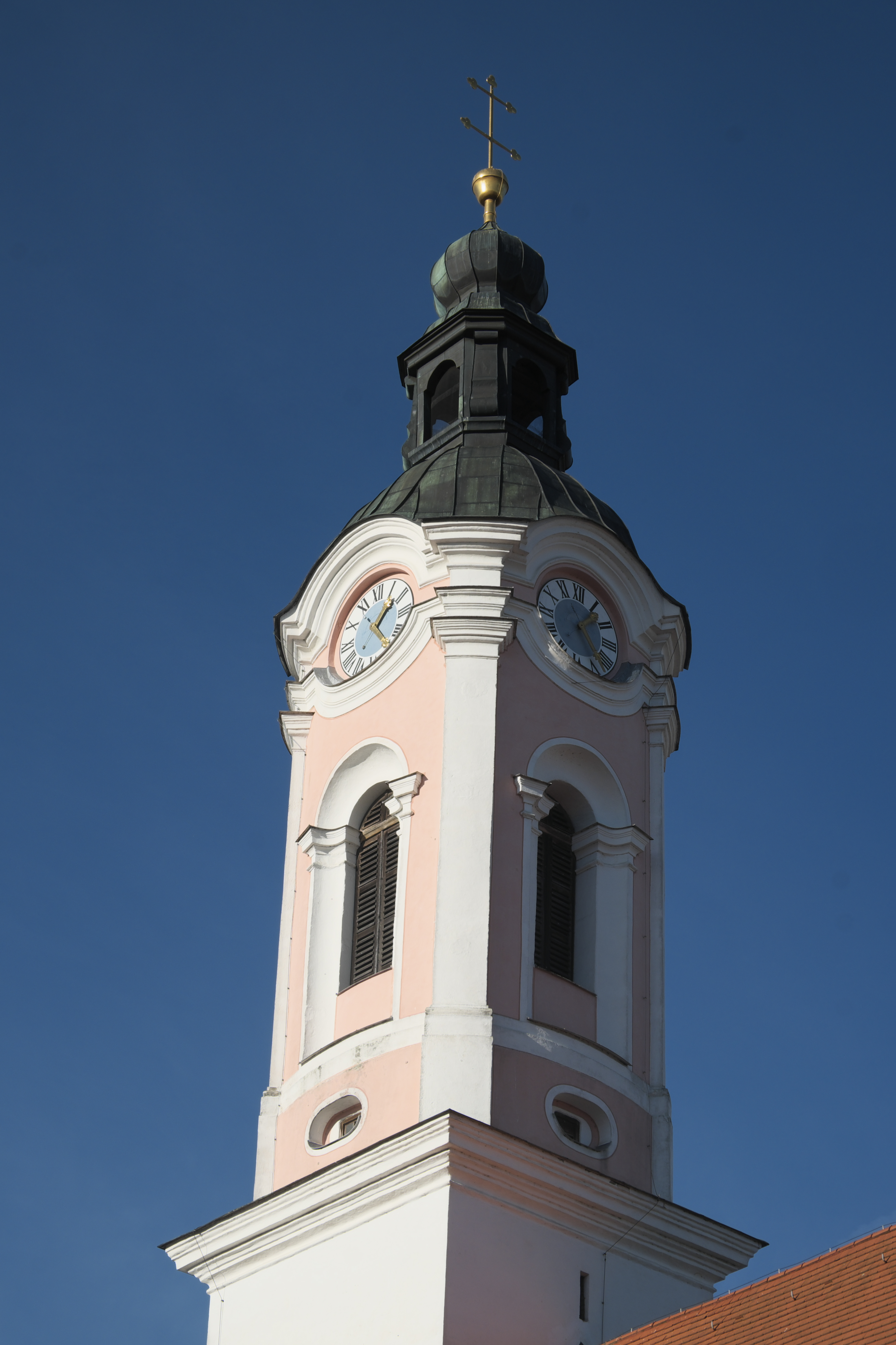 Katholische Pfarrkirche St. Johannes der Täufer in Zolling im Landkreis Freising (Bayern/Deutschland), Turm